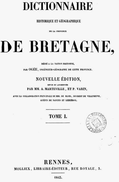 Couverture du tome 1 de la nouvelle édition en 1843 par Molliex à Nantes du livre de Jean-Baptiste Ogée publié initialement en 1780, revue et augmentée par A. Marteville et P. Varin, fréquemment désignés "continuateurs d'Ogée" par les historiens.